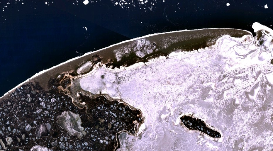 Русский Заворот